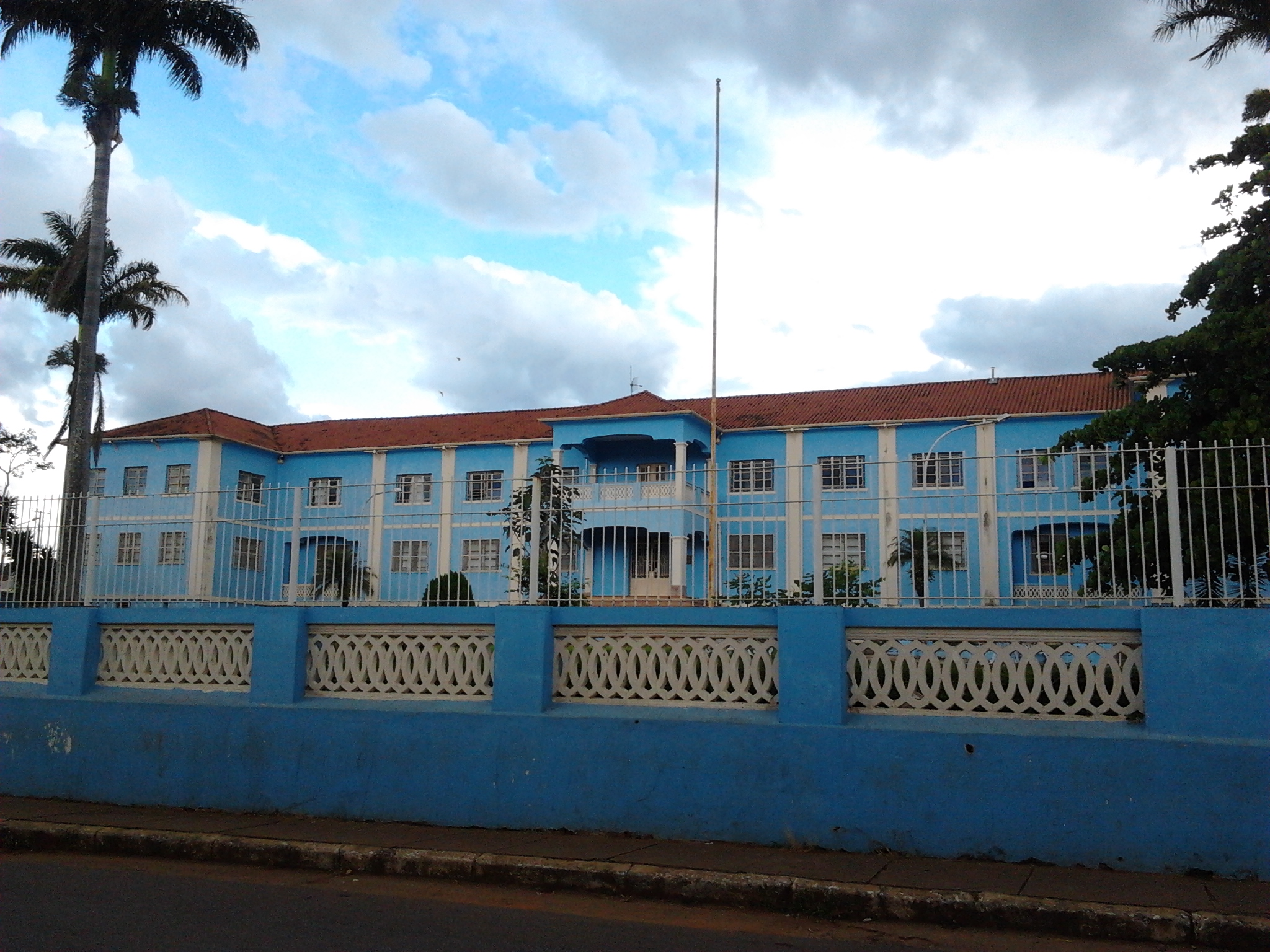 Uma das maiores escolas de Três Pontas